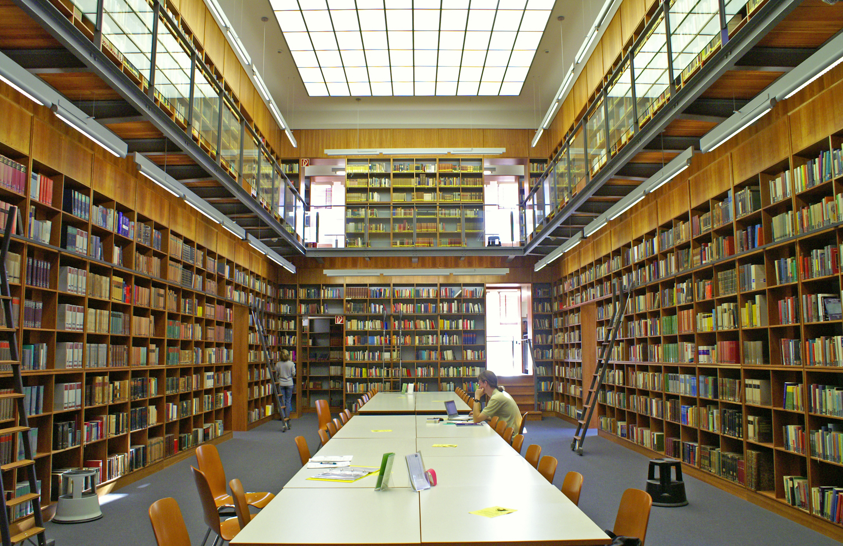 Bibliothek im IG-Hochhaus auf dem Campus Westend der Goethe-Universität FrankfurtThis is a photograph of an architectural monument.It is on the list of cultural monuments of Frankfurt am Main